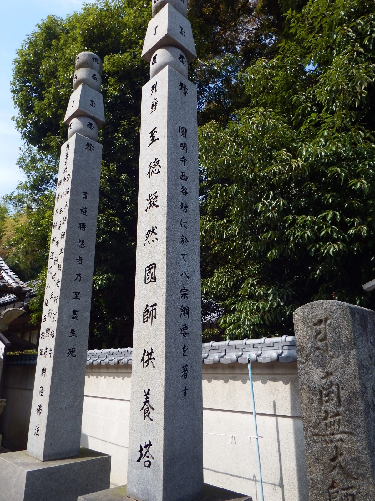 延命寺 凝然国師供養塔